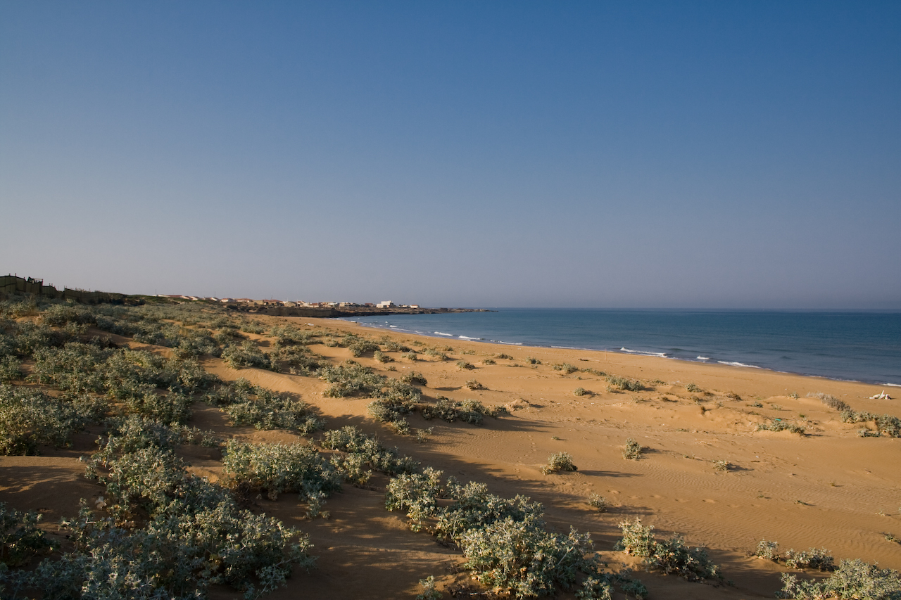 La linea della costa e la vegetazione pioniera; sullo sfondo Punta Braccetto.